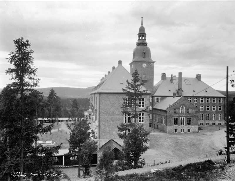 Vardåsen tuberkulosesanatorium i Asker, åpnet i 1923